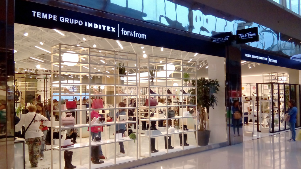 Tenda de Tempe en Coruña The Style Outlets Alvedro, Culleredo.